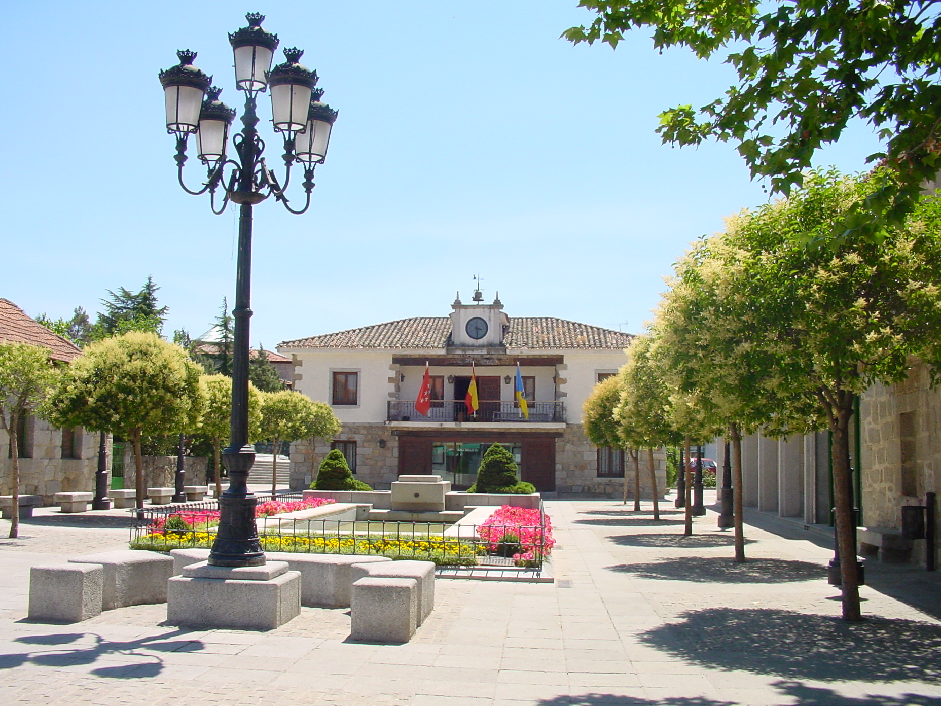 Ayuntamiento de Torrelodones.